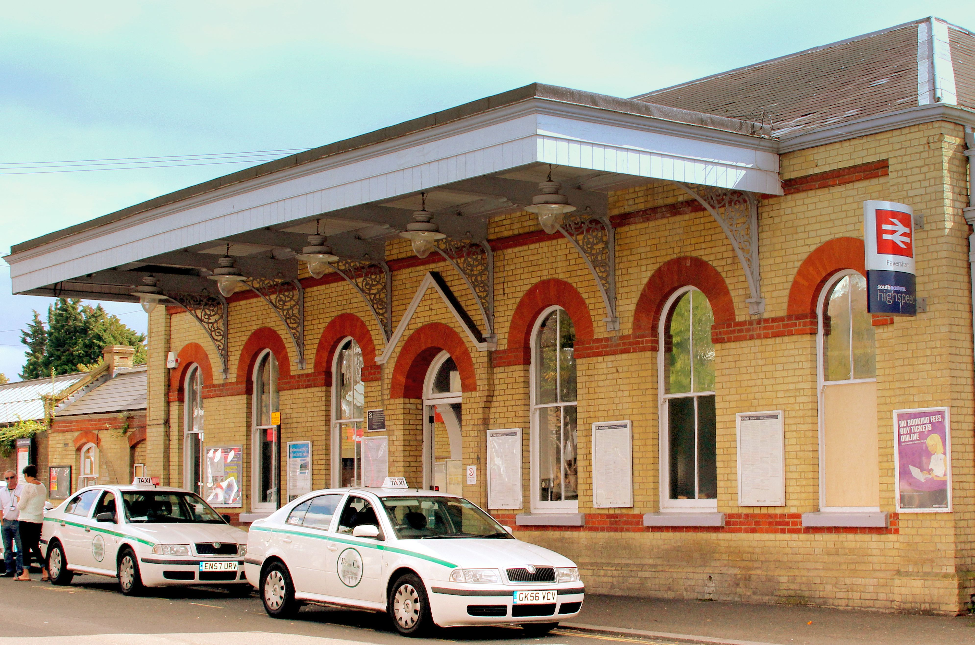 FAVERSHAM RAILWAY STATION KENT AUG 2014